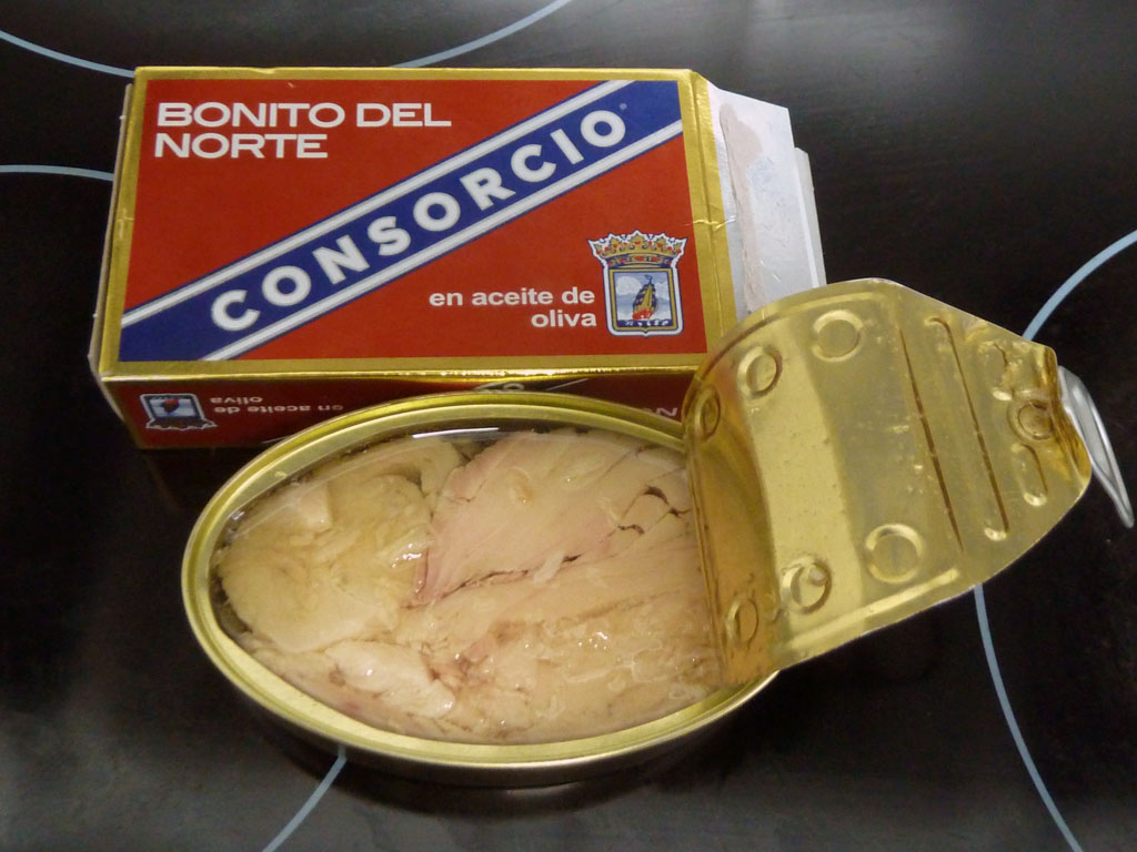 Conserva de bonito del Norte, en aceite de oliva.